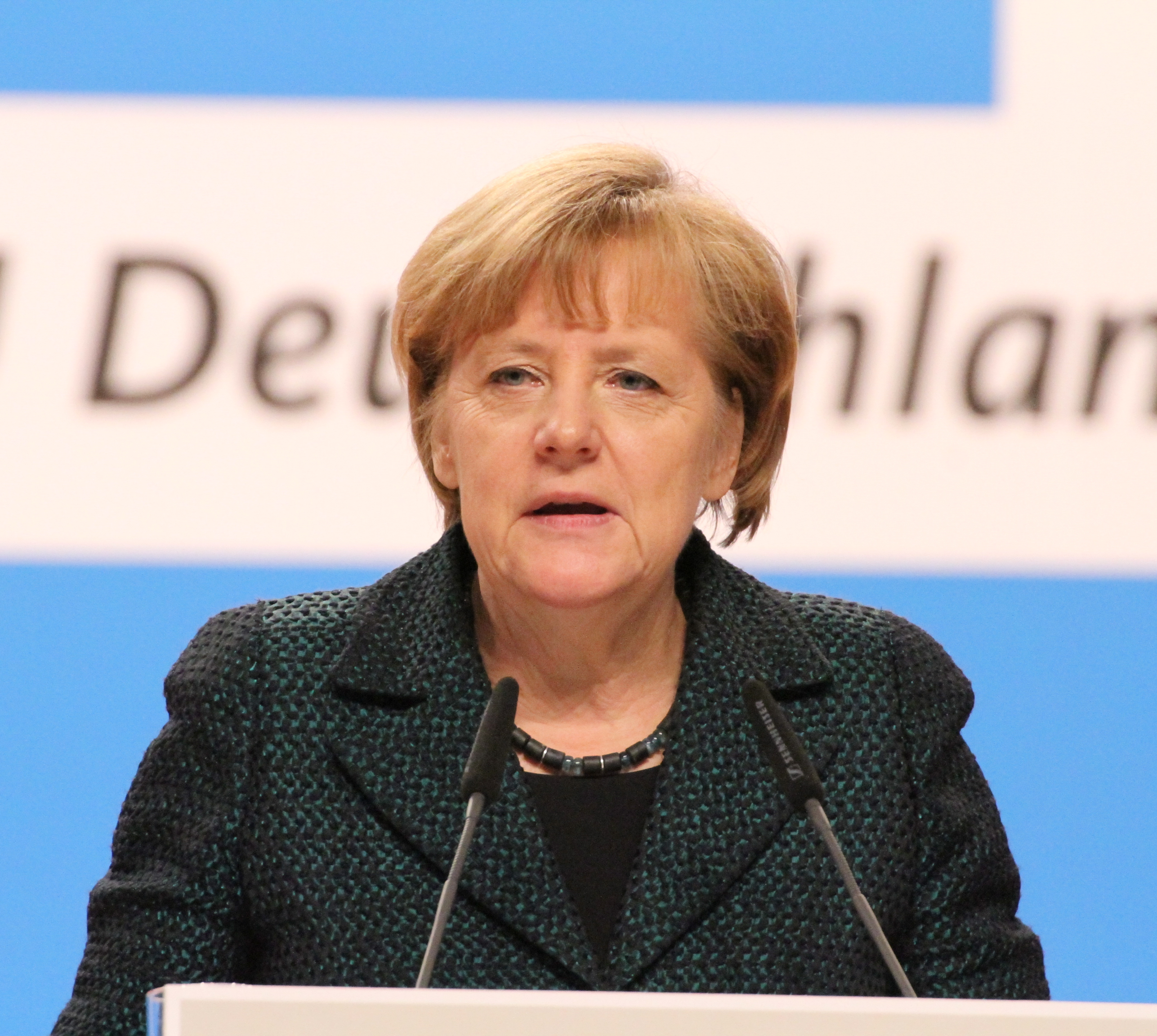 Angela Merkel auf dem CDU Bundesparteitag Dezember 2014 in Köln